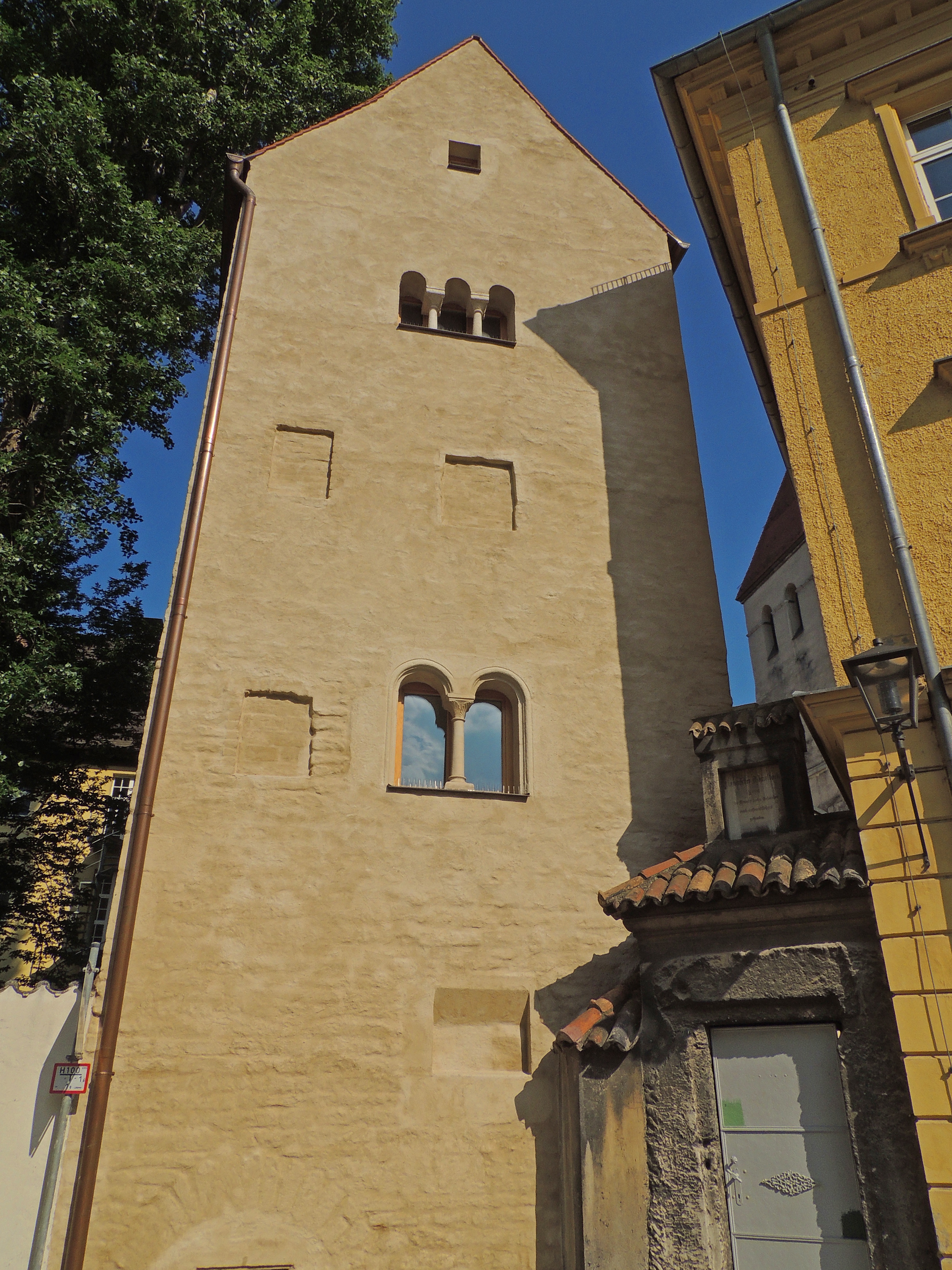 Das romanische dreieinhalbgeschossige Turmhaus aus dem Jahr 1196 ist nur von der Salzburger Gasse aus zu sehen. D-3-62-000-606This is a photograph of an architectural monument.